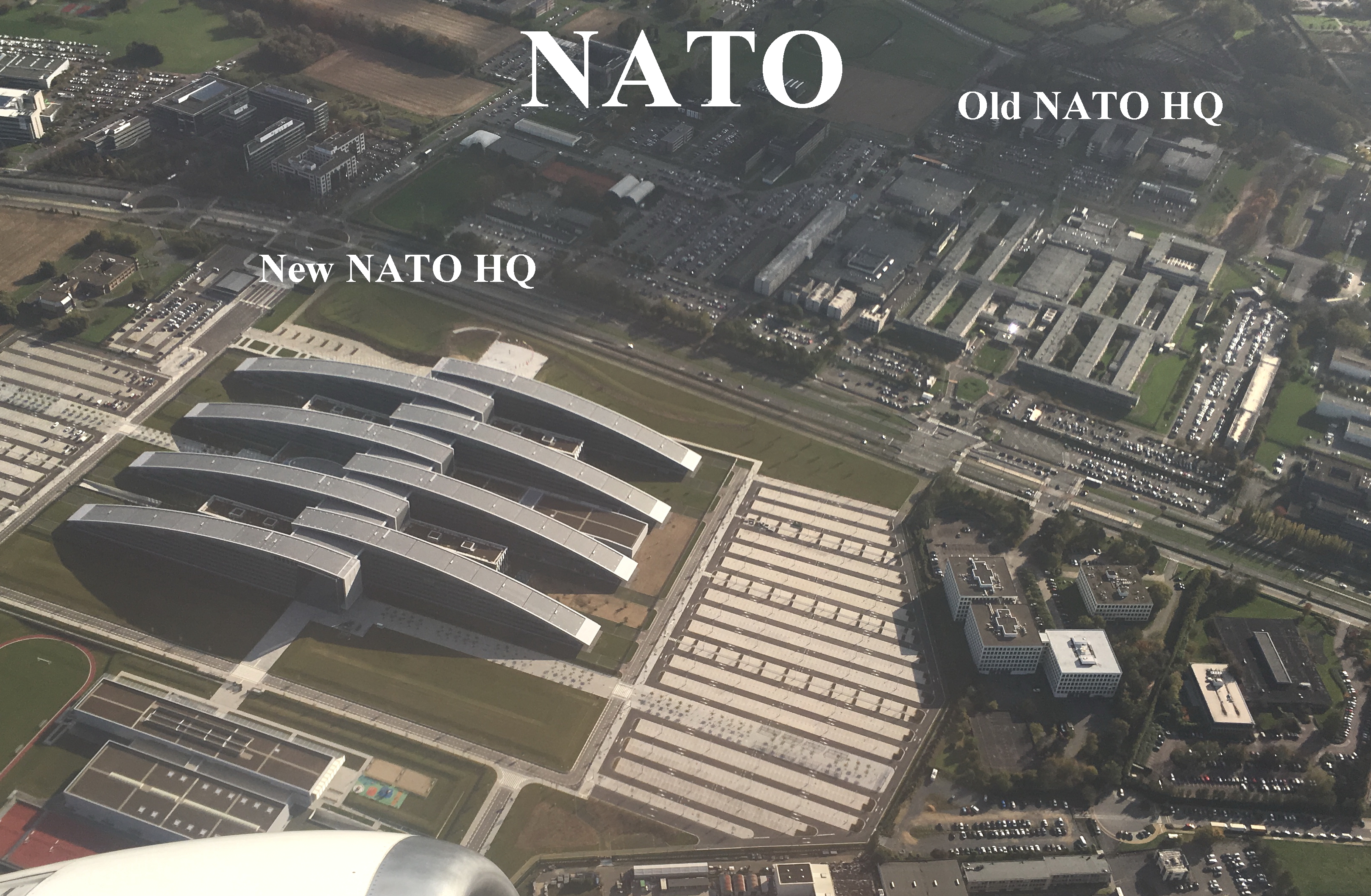 Слева - новая штаб-квартира НАТО, а справа вверху - старая.